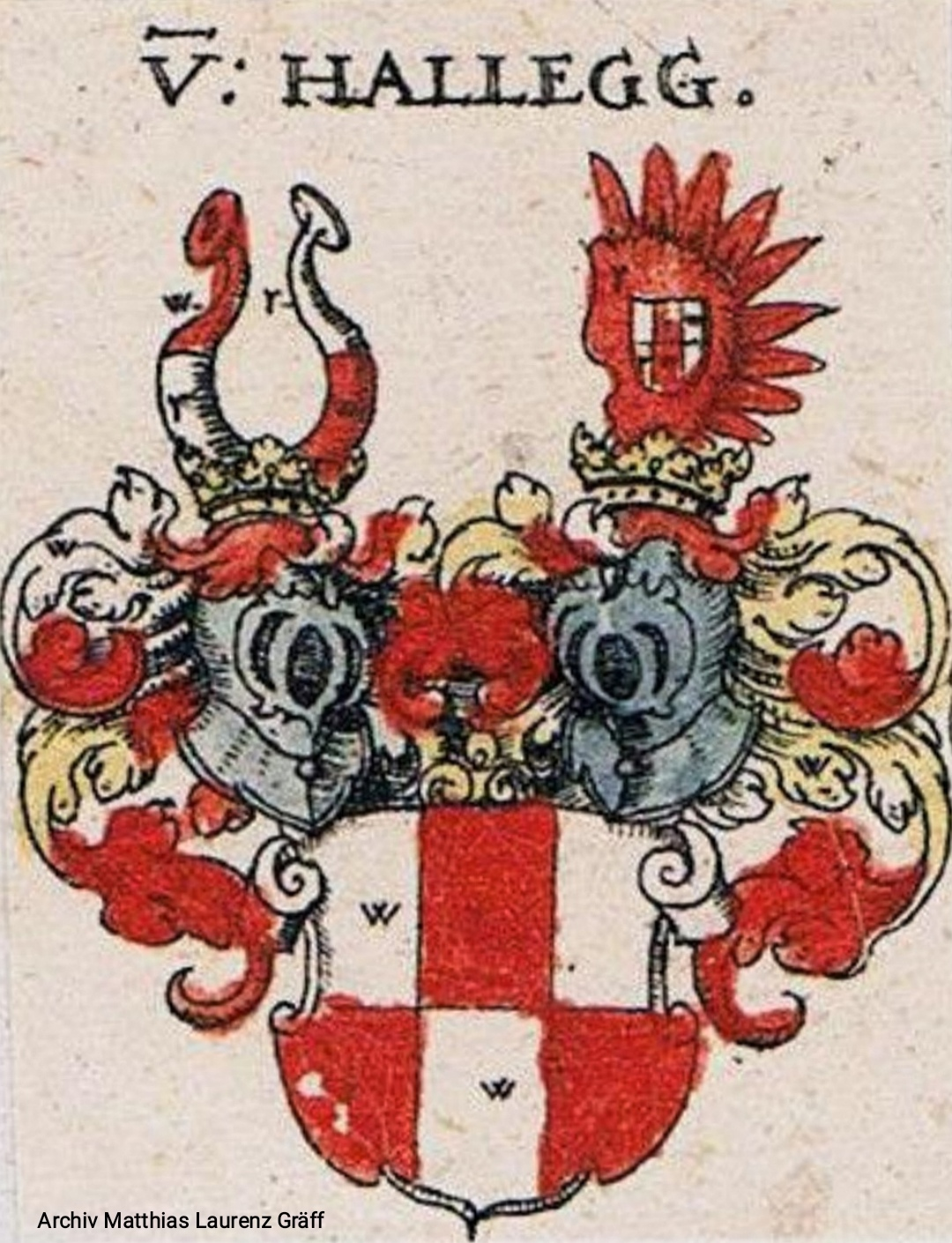 Wappen der Herren von Hallegg (Hallecker), Kärnten